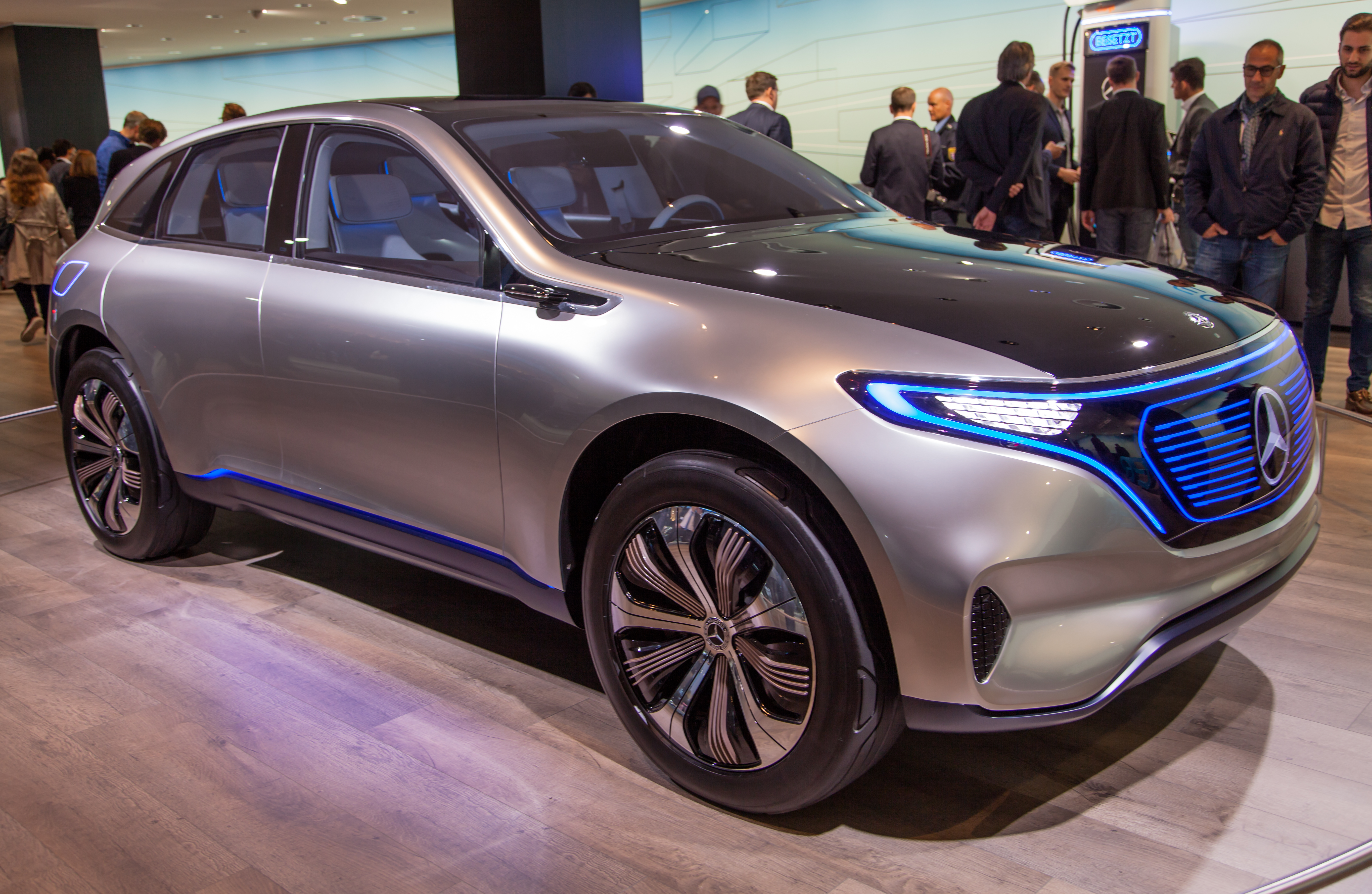 Mercedes Generation EQ